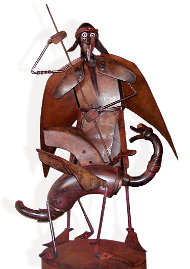 Tant bien que male, sculpture de Philippe Depienne, Cantin (Nord, France)